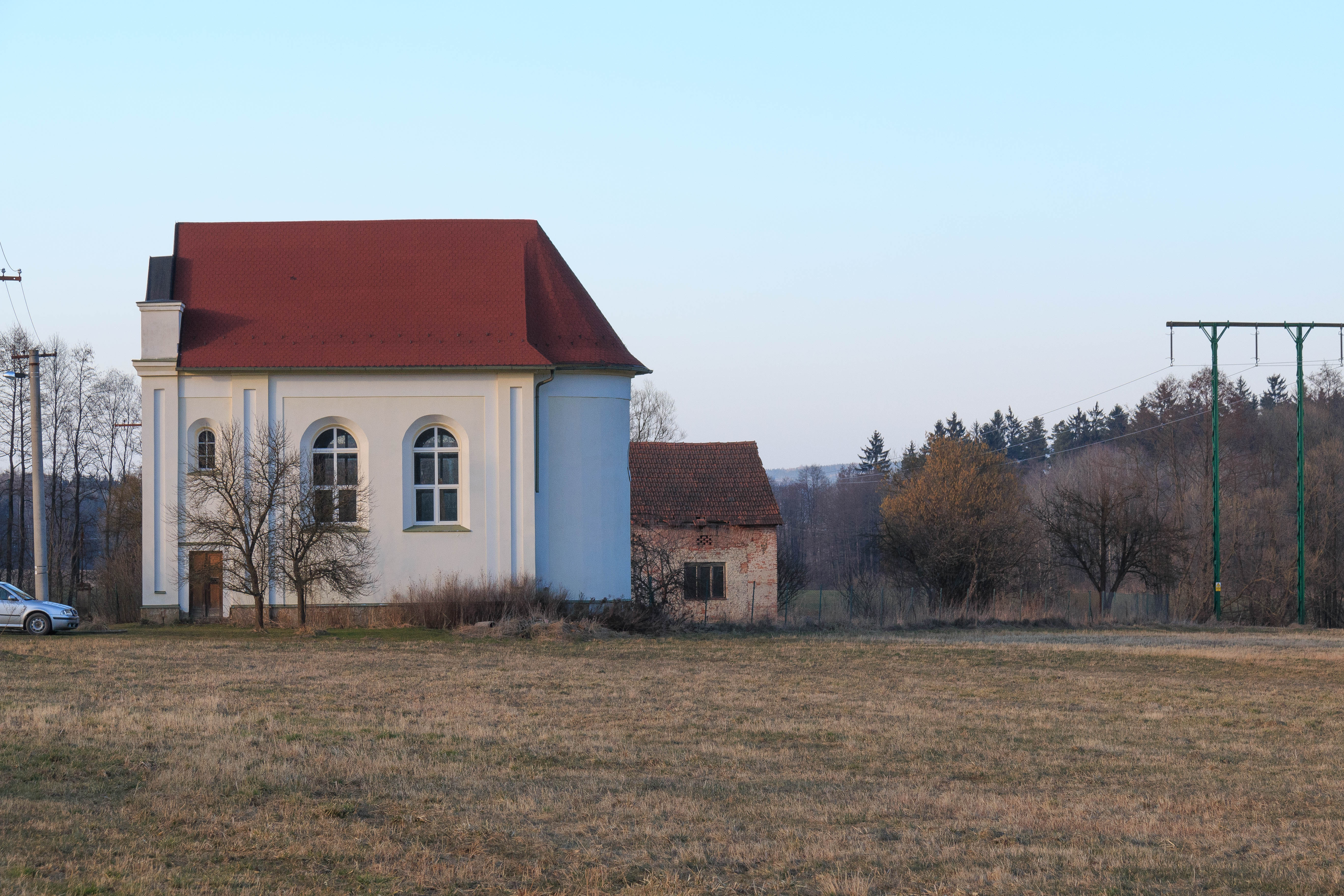 bývalý kostelík v Zádolce